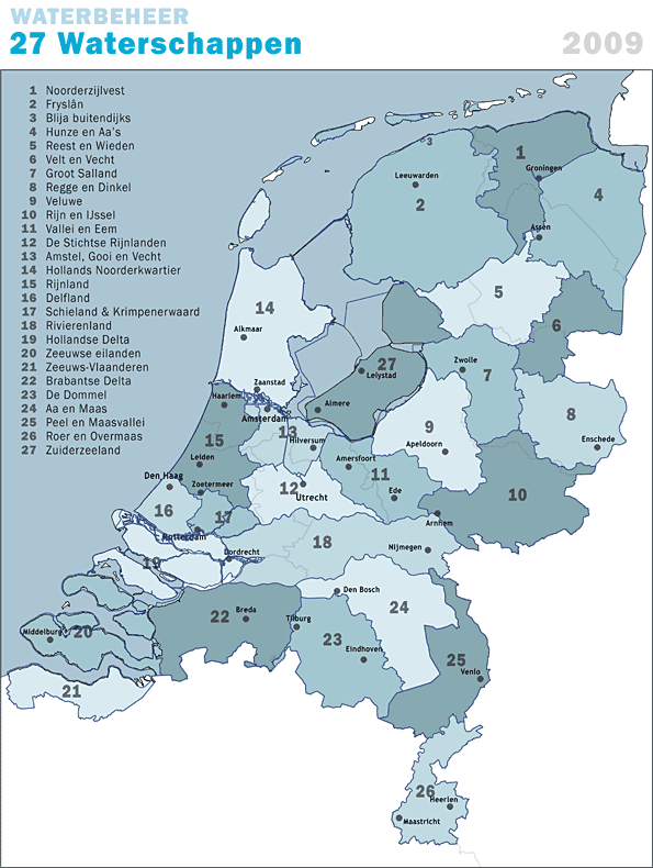 Overzicht van de Waterschappen in Nederland, situatie 2009. Vectorgrenzen van gemeenten en regio's vrij ter beschikking gesteld met dank aan cartografen van brandweerregio's Hollands-Midden en IJsselland; gerasterd in Photoshop. aterschapsgrenzen: pg.1 uit PDF "Waterschappen-grenzen-2007.pdf", te downloaden via Gebruik is vrij met bronvermelding.